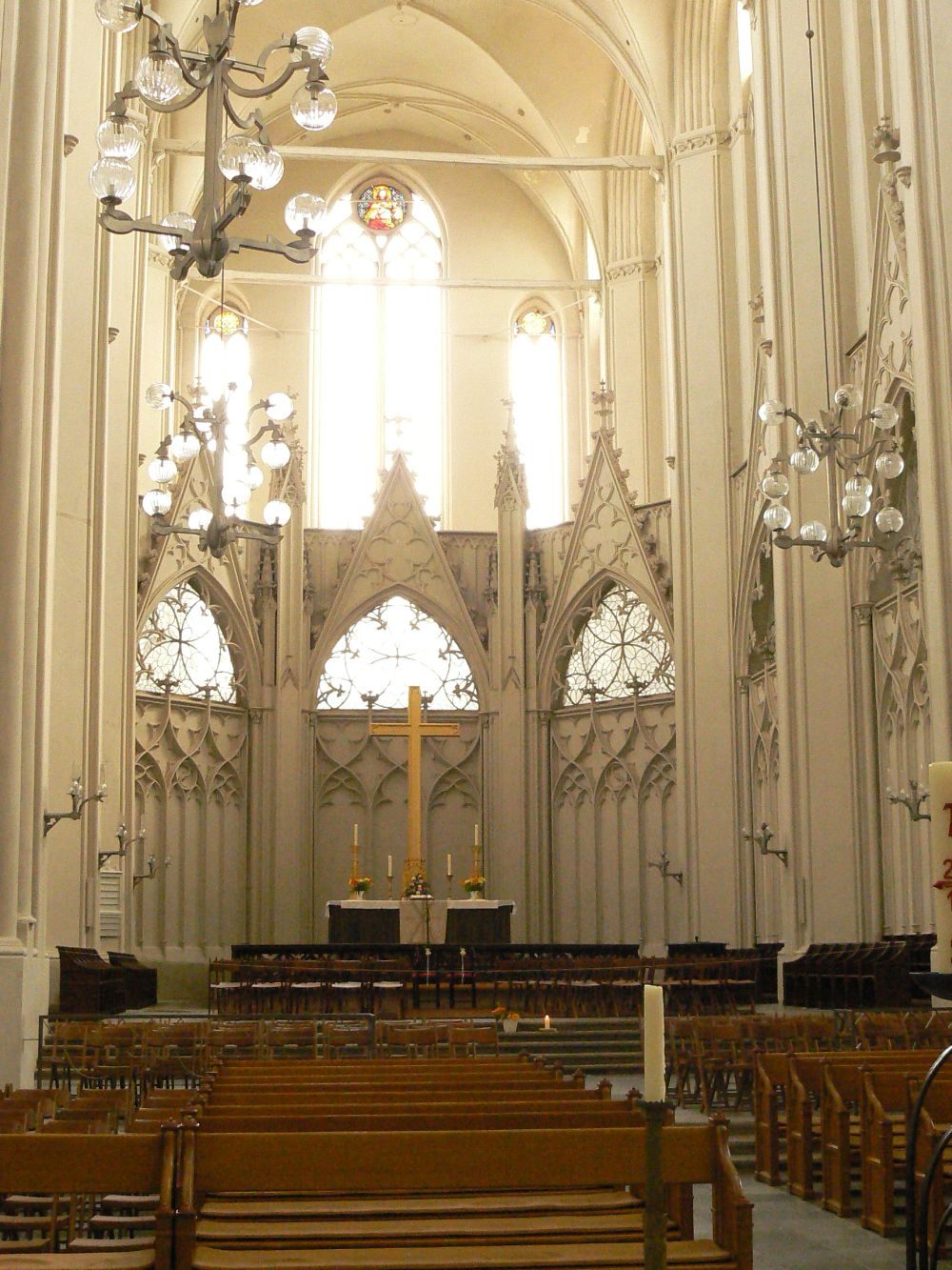 Greifswald, Dom St. Nikolai, Chor